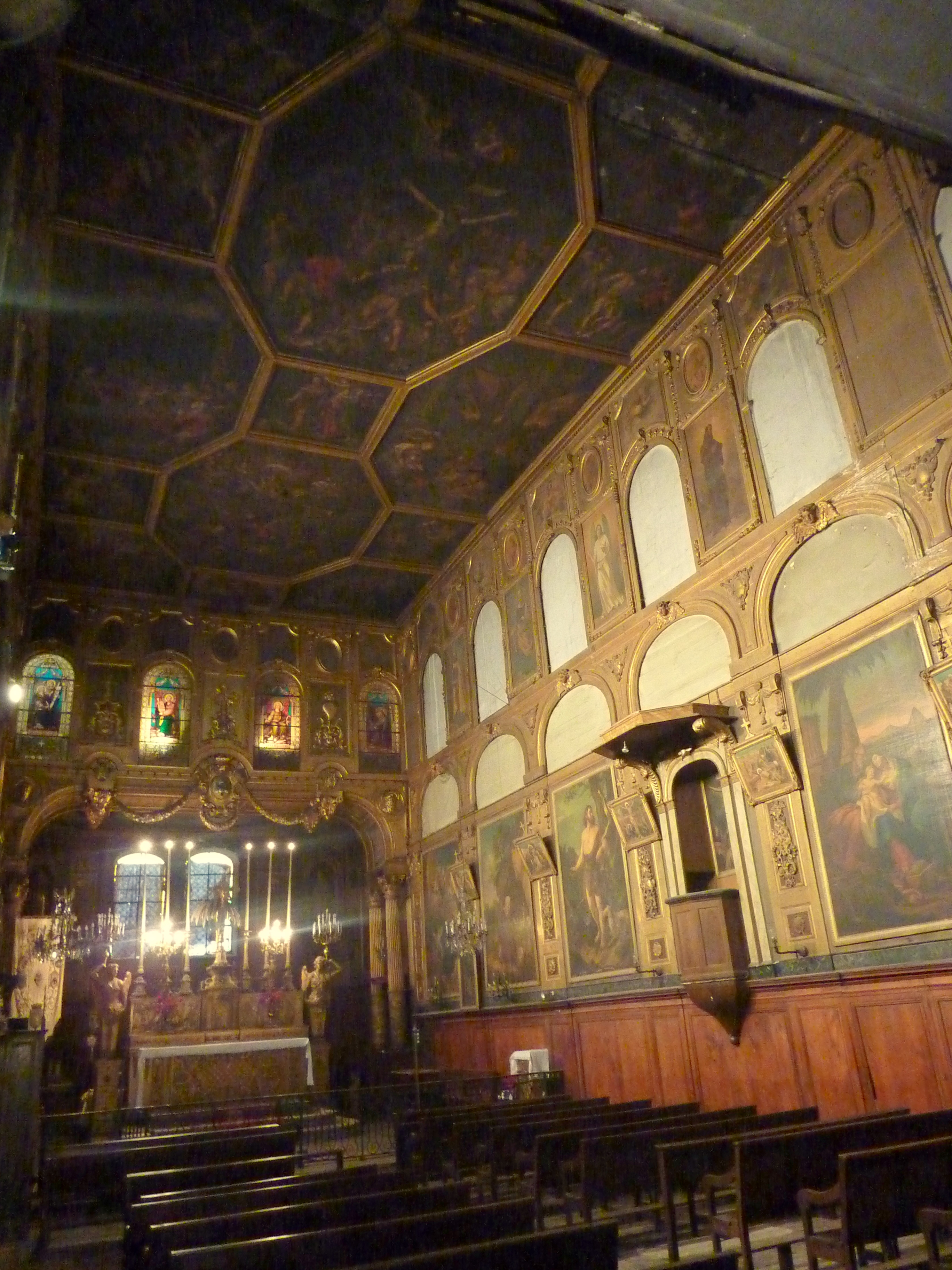 Vue de la chapelle avec notamment son plafond à compartiment et son décor de boiseries du XVII° siècle.